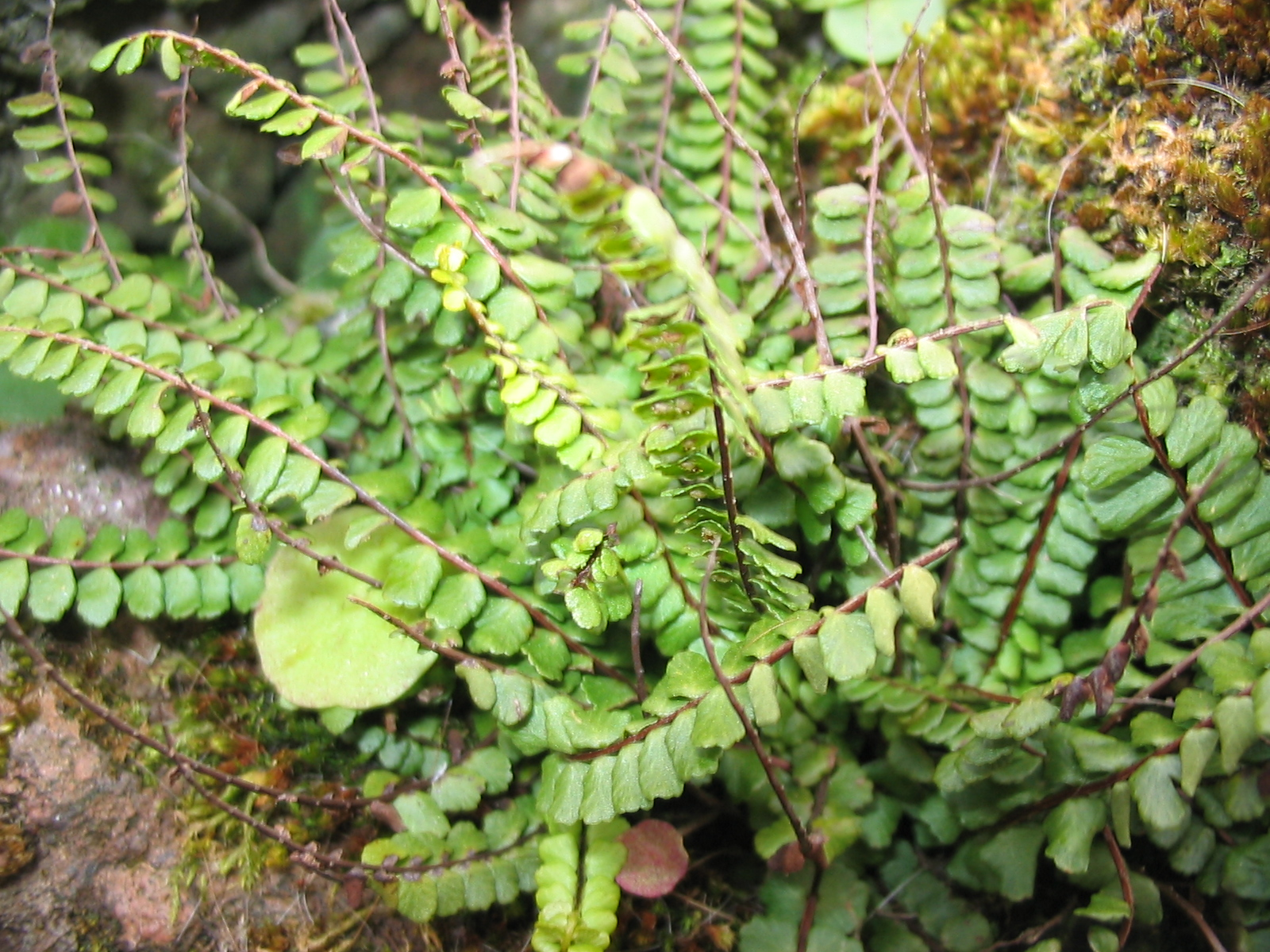 Azoreanischer Strichfarn (Asplenium azoricum) - Habitus